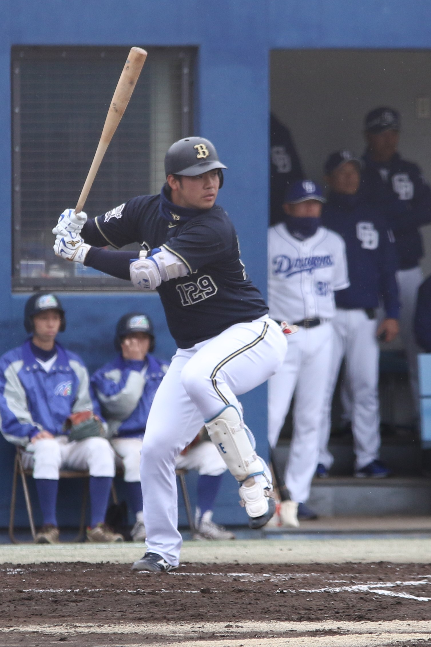 2019年3月17日、ナゴヤ球場にて